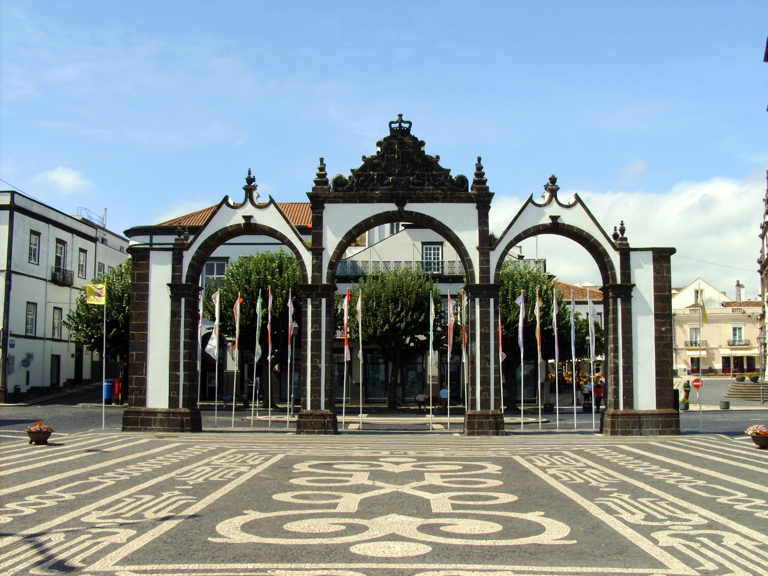 Portas da Cidade, Ponta Delgada, Ilha de São Miguel, Açores.